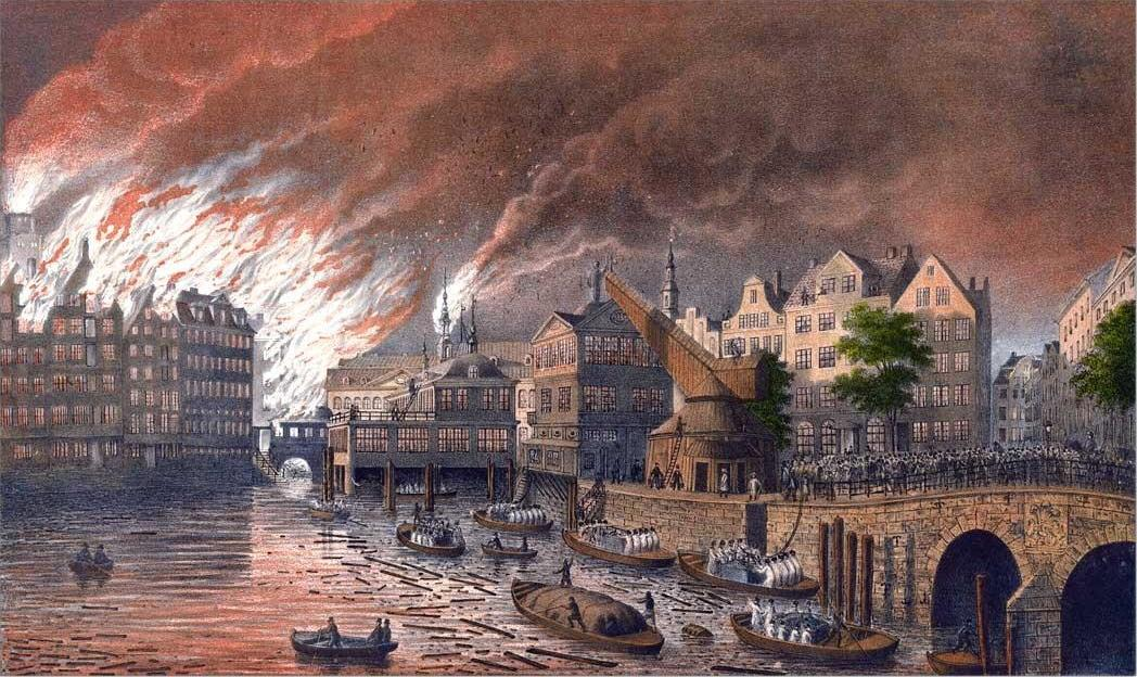 Bild des Hamburger Brandes von 1842.